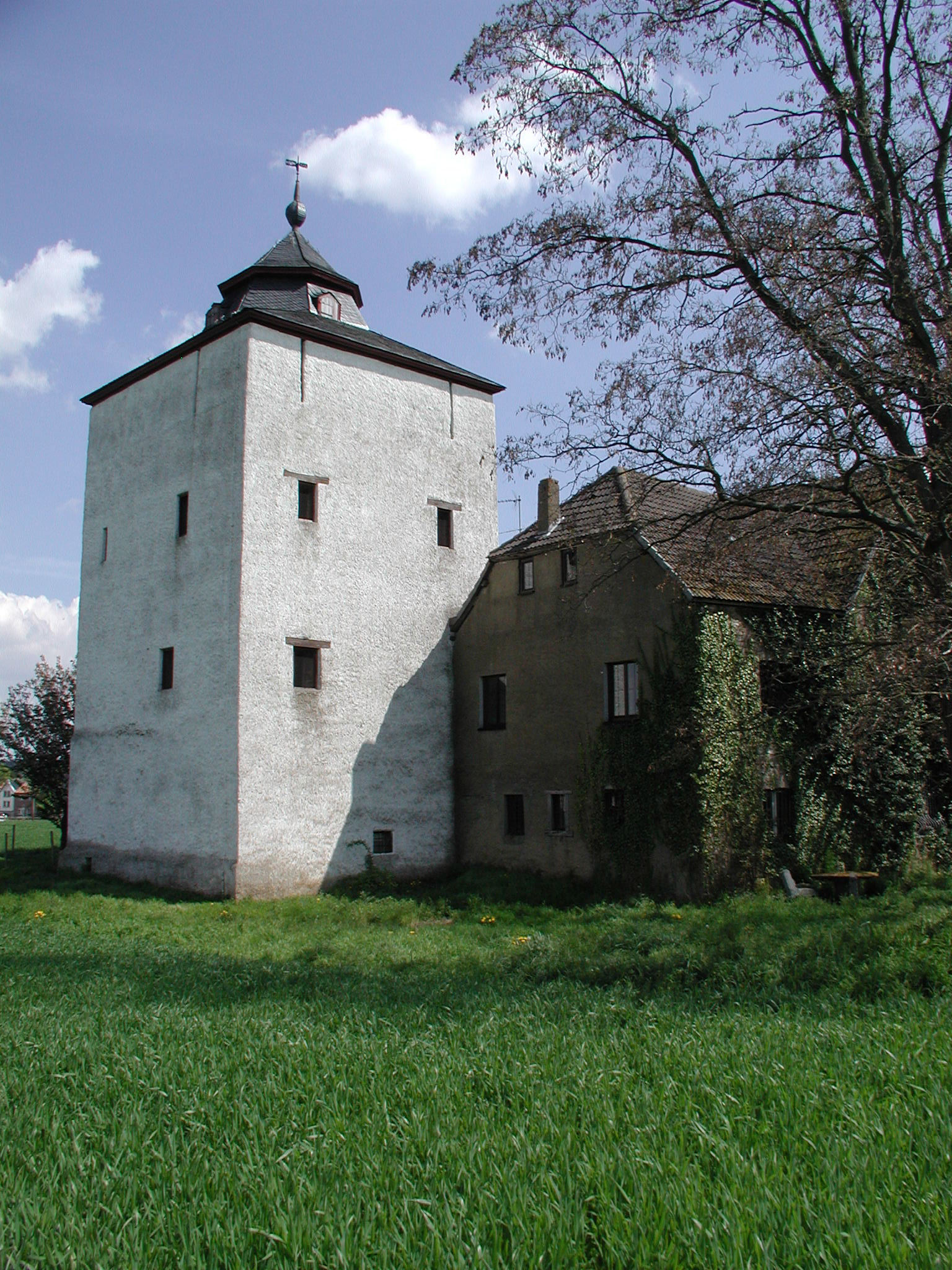 Bad Münstereifel Arloff. Burg Arloff, Feldseite